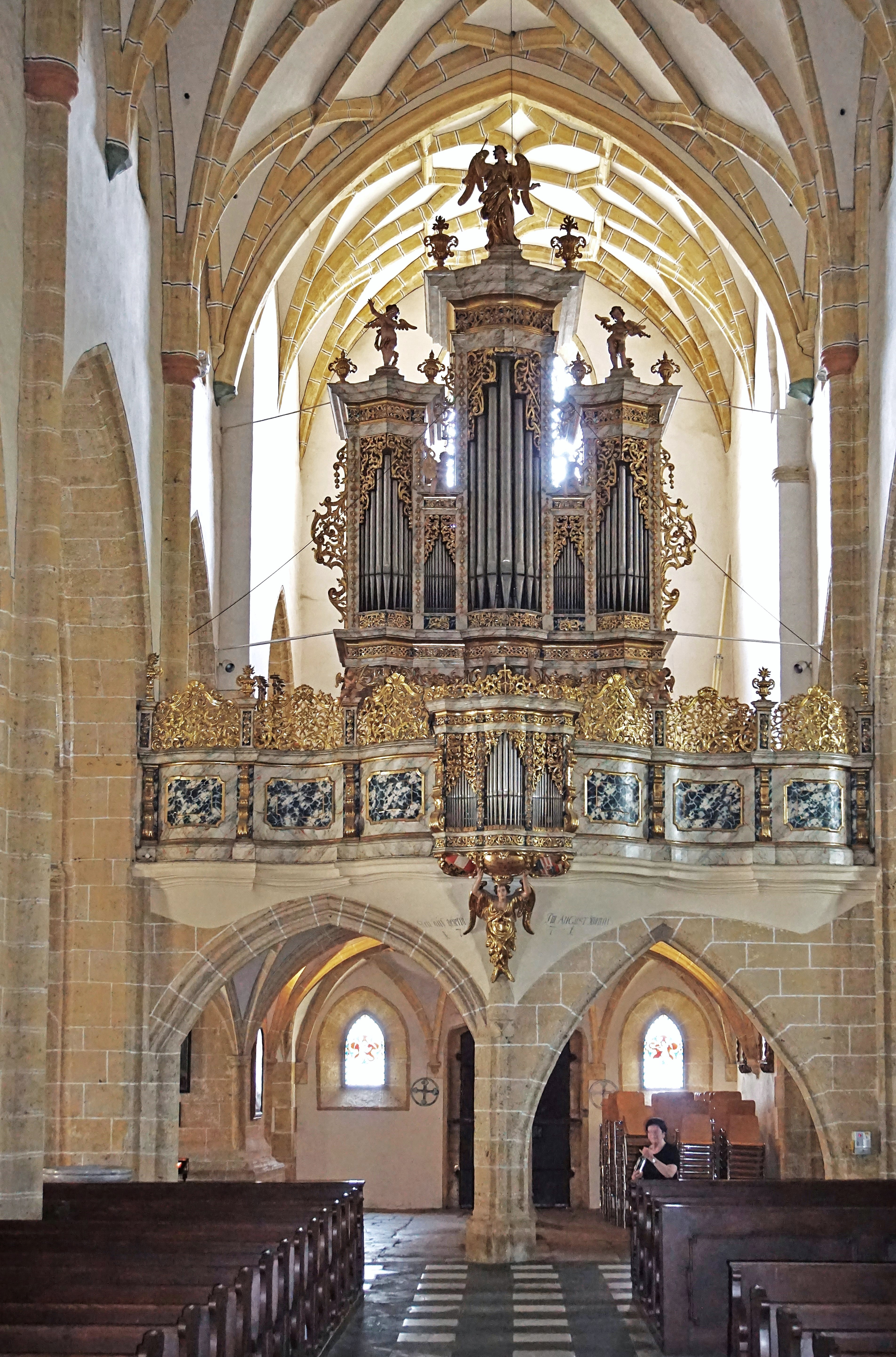 Wallfahrtskirche, Dom zu Maria Saal, Orgelempore